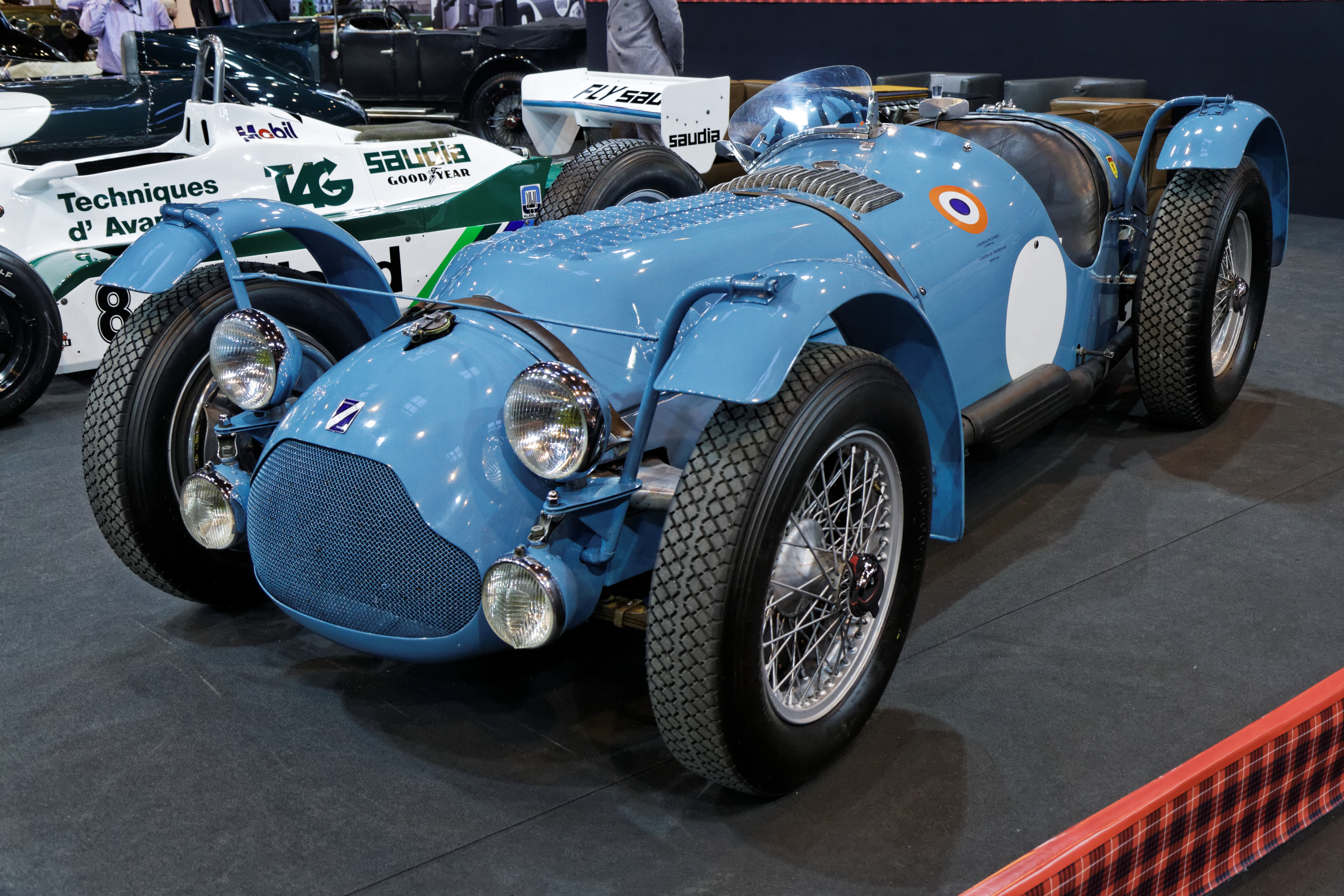 Une Talbot Lago T26 GS exposée lors du salon Retromobile 2014.